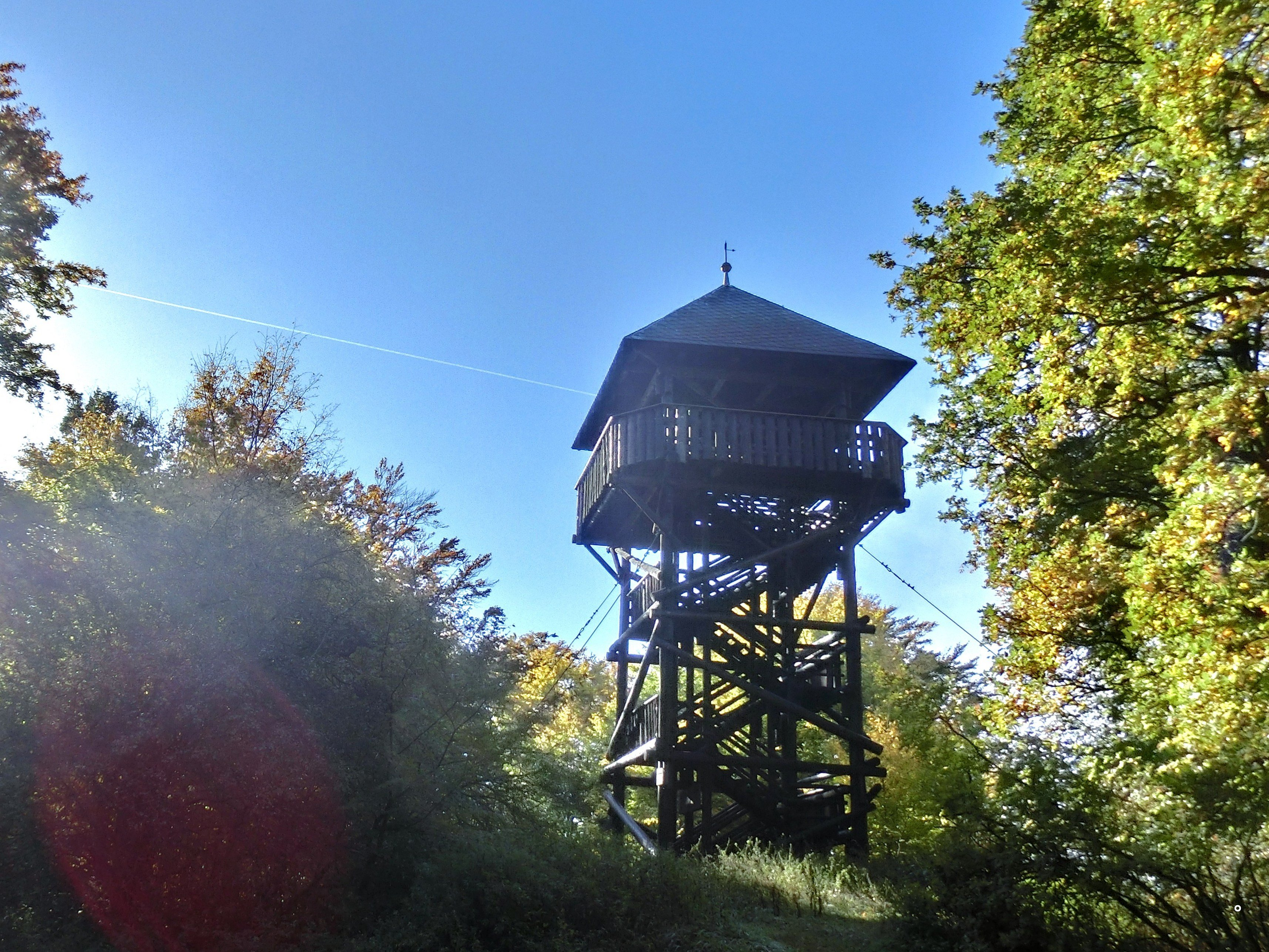 Aussichtsturm auf der Hohen Warte